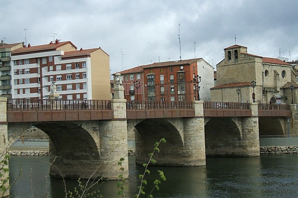 Puente de Carlos III sobre el Ebro e Iglesia del Espíritu Santo, Miranda de Ebro, Burgos, España/Spain